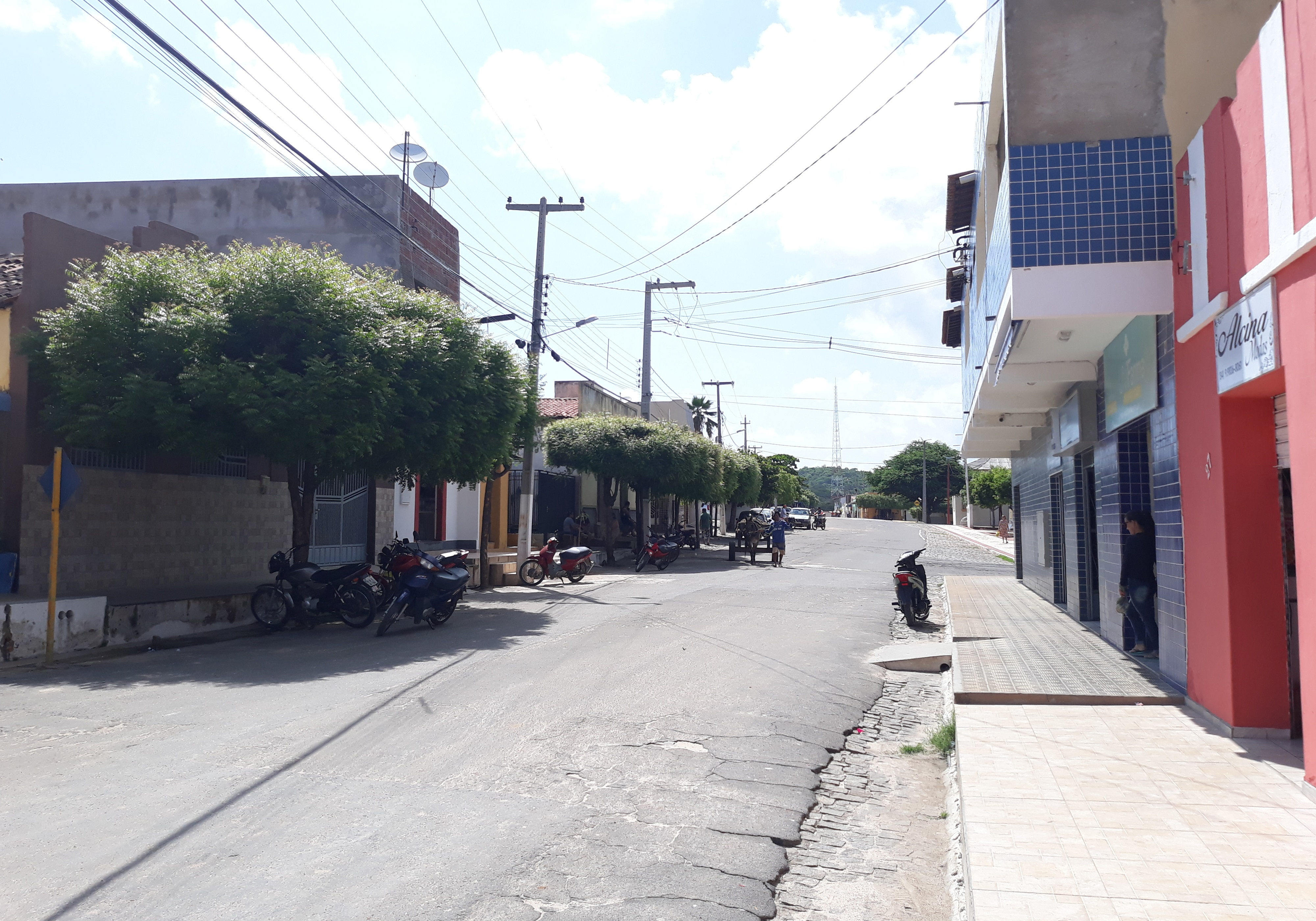 Rua Francisco Nunes de Amorim em Almino Afonso, Rio Grande do Norte (Brasil)